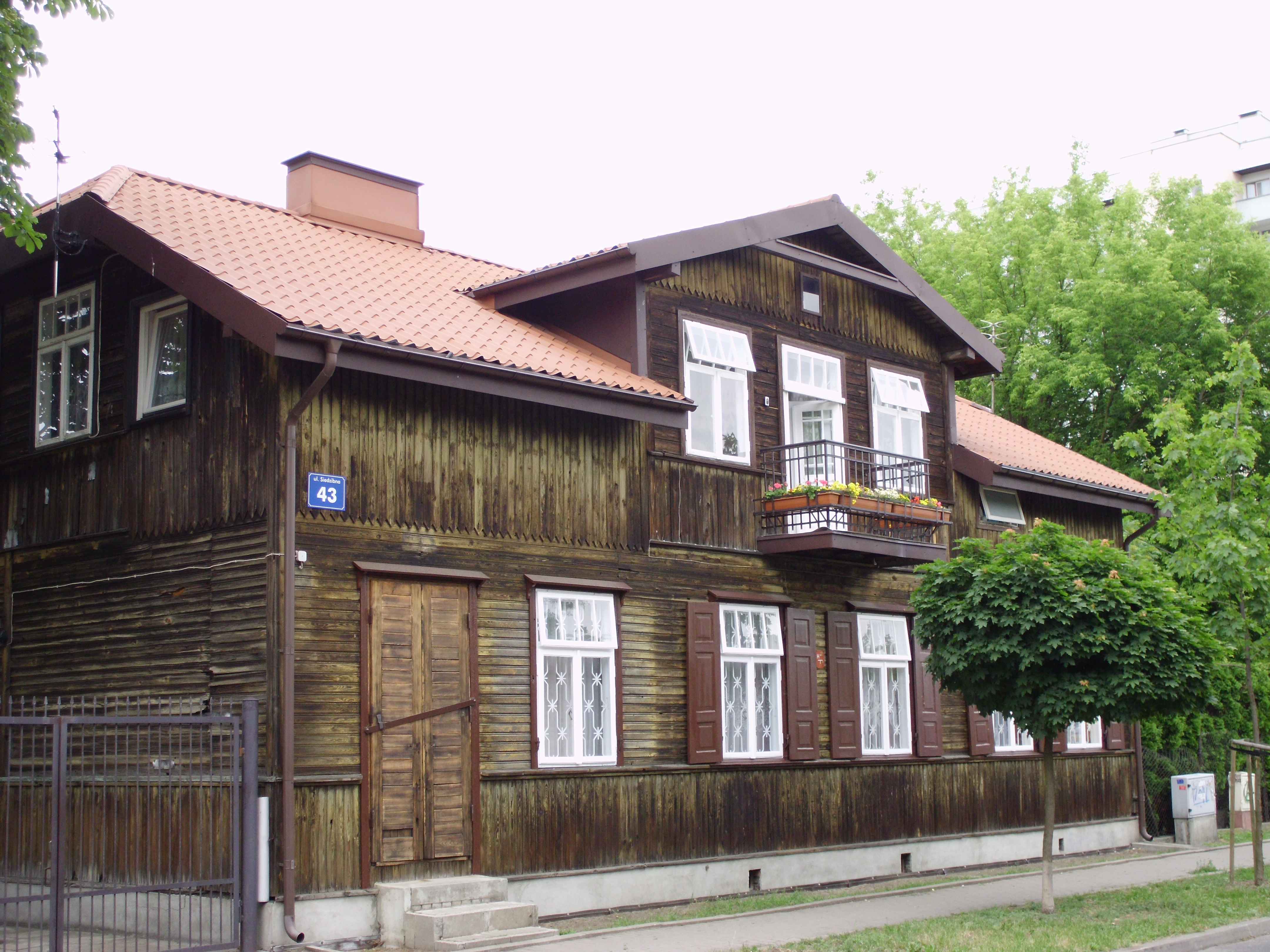 Drewniany dom na Ul. Siedzibnej na Bródnie. Warszawa. Polska.